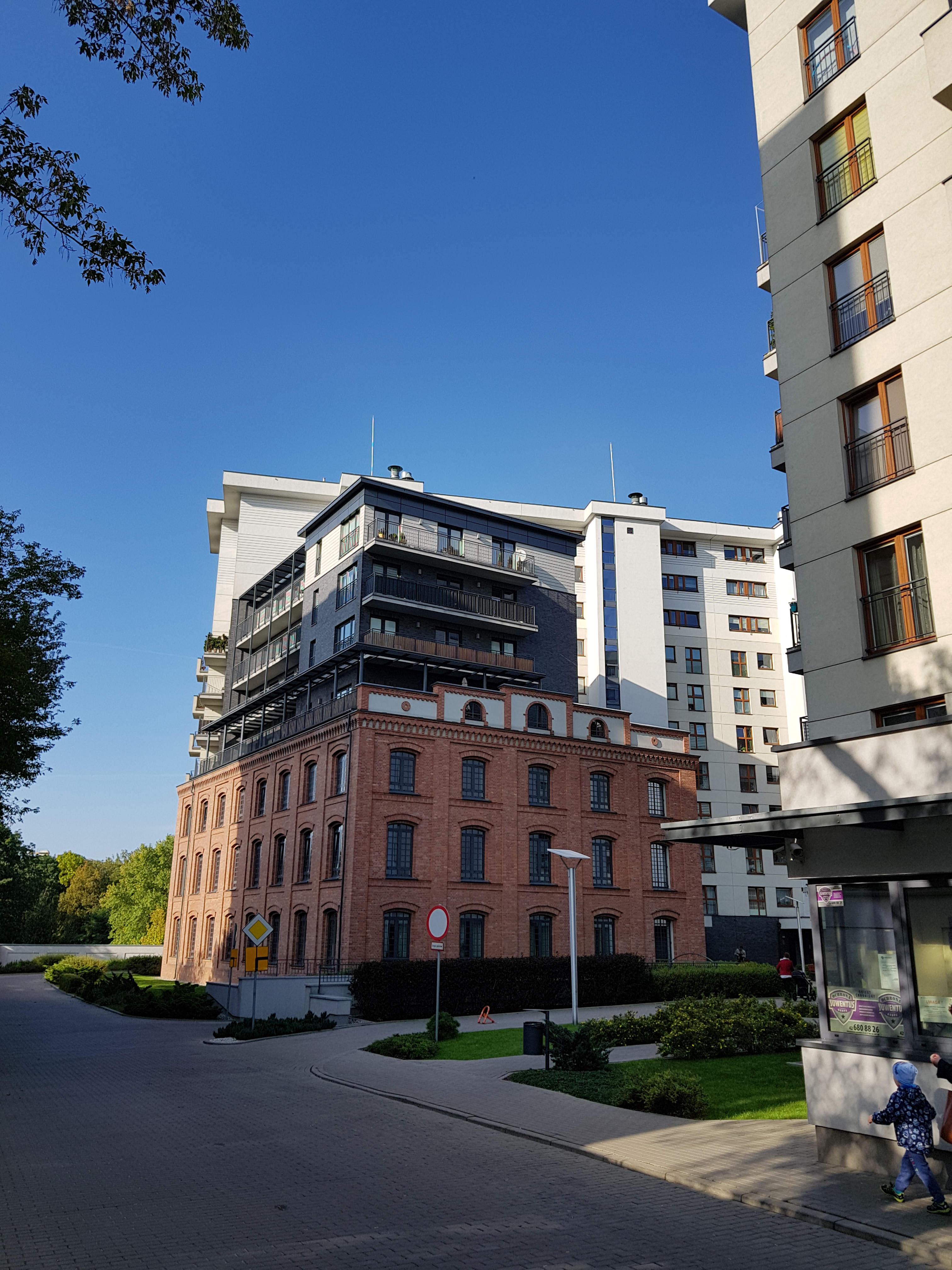 Obecnie wspólnota mieszkaniowa Arboretum. projekt łódzkiej firmy Staszewscy Ziółkowscy. Dawniej fabryka Aleksandra Schichta.